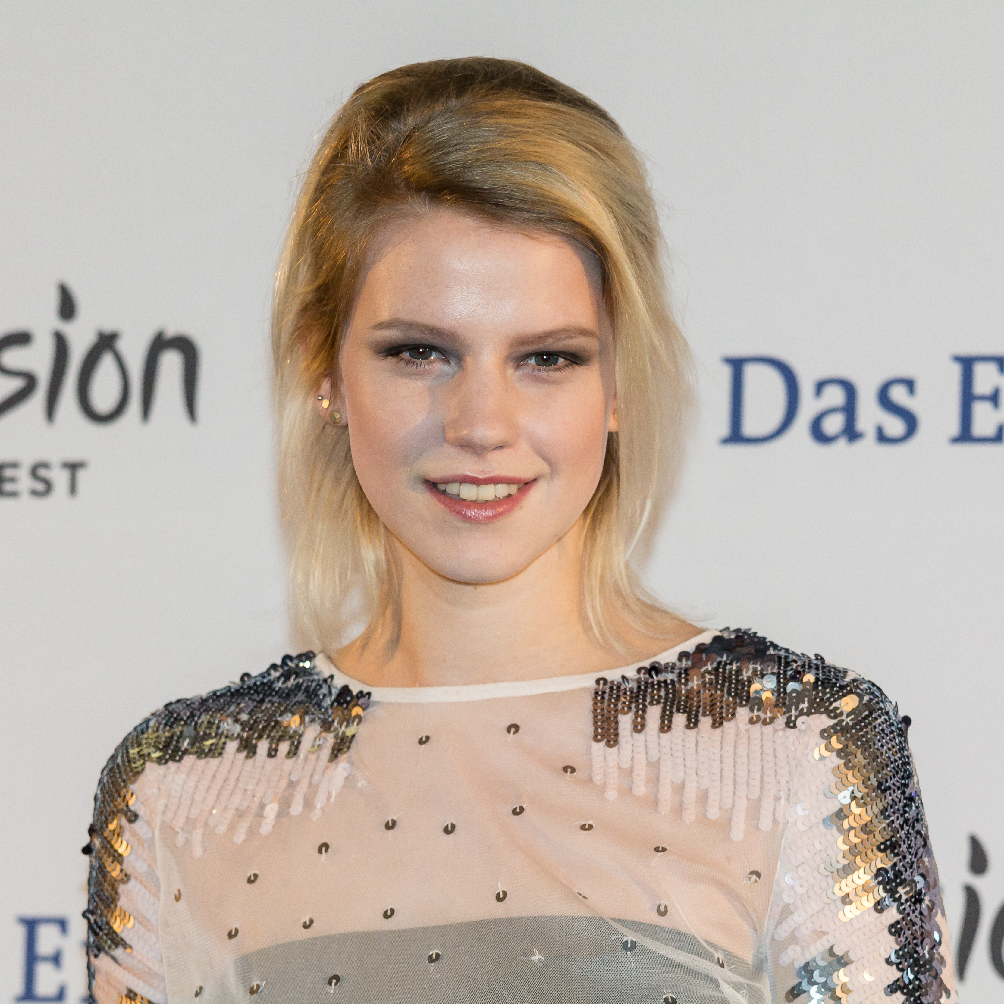 Unser Song 2017 - Pressekonferenz - Isabella „Levina“ Lueen